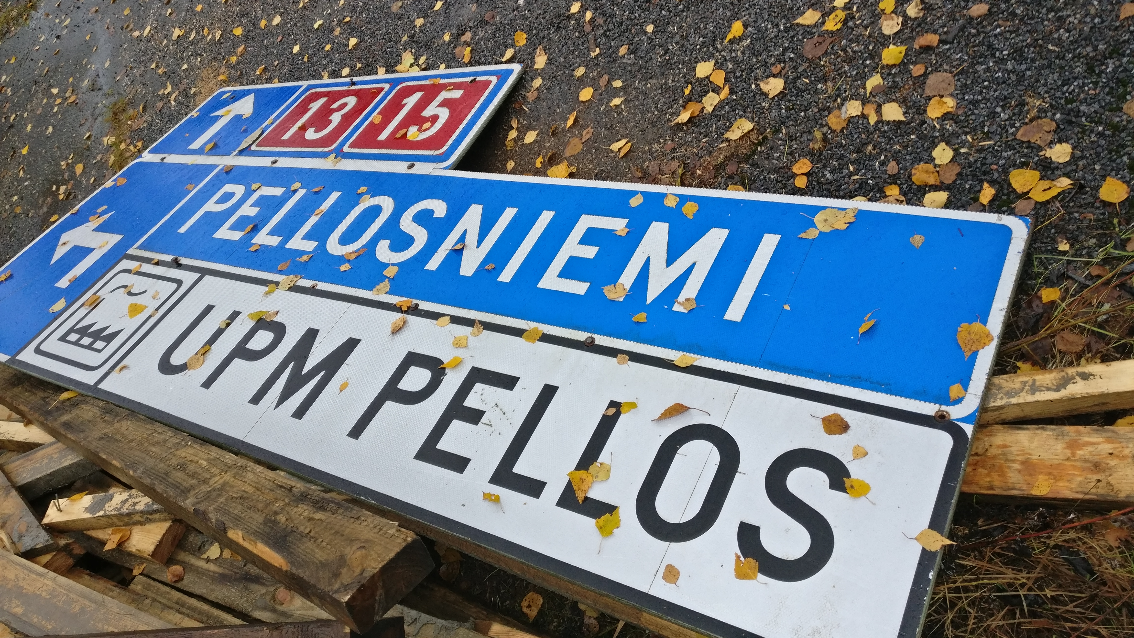 Maassa makaava opaste, joka opastaa kohti Pellosniemeä ja UPM:n Pelloksen tehdasta.